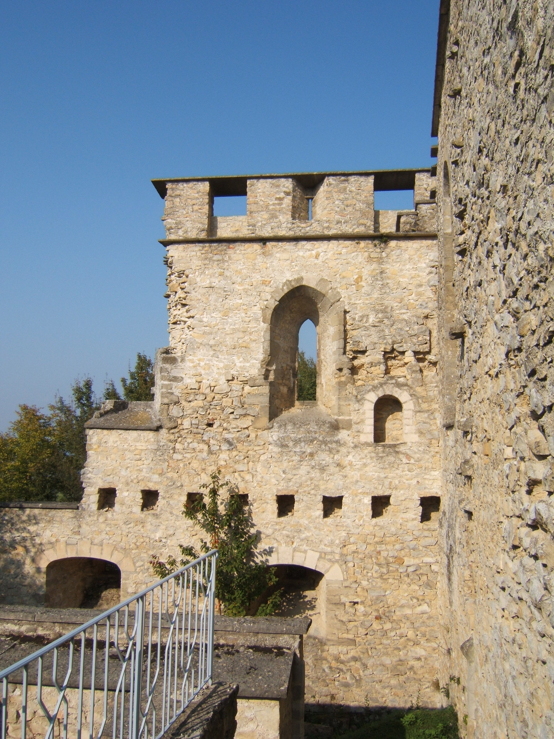 Château de Fallavier (France), mur Nord de la chapelle